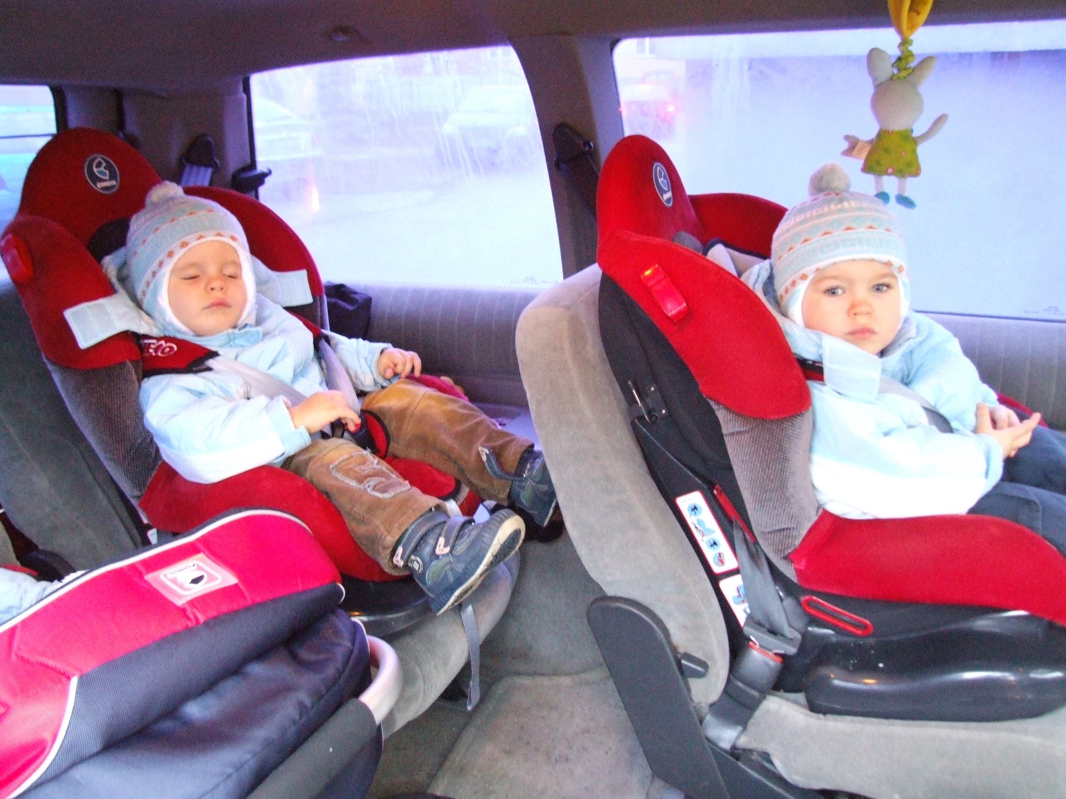 dzieci w fotelikach samochodowych